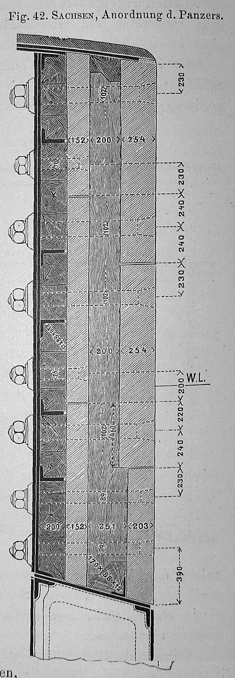 SMSSachsen aus: von Kronenfels, J. F.: Das schwimmende Flottenmaterial der Seemächte. Eine kurzgefasste Beschreibung der wichtigsten europäischen, amerikanischen und asiatischen Kriegsschiffe der neueren und neuesten Zeit. A. Hartleben's Verlag, Wien. Pest. Leipzig 1881.